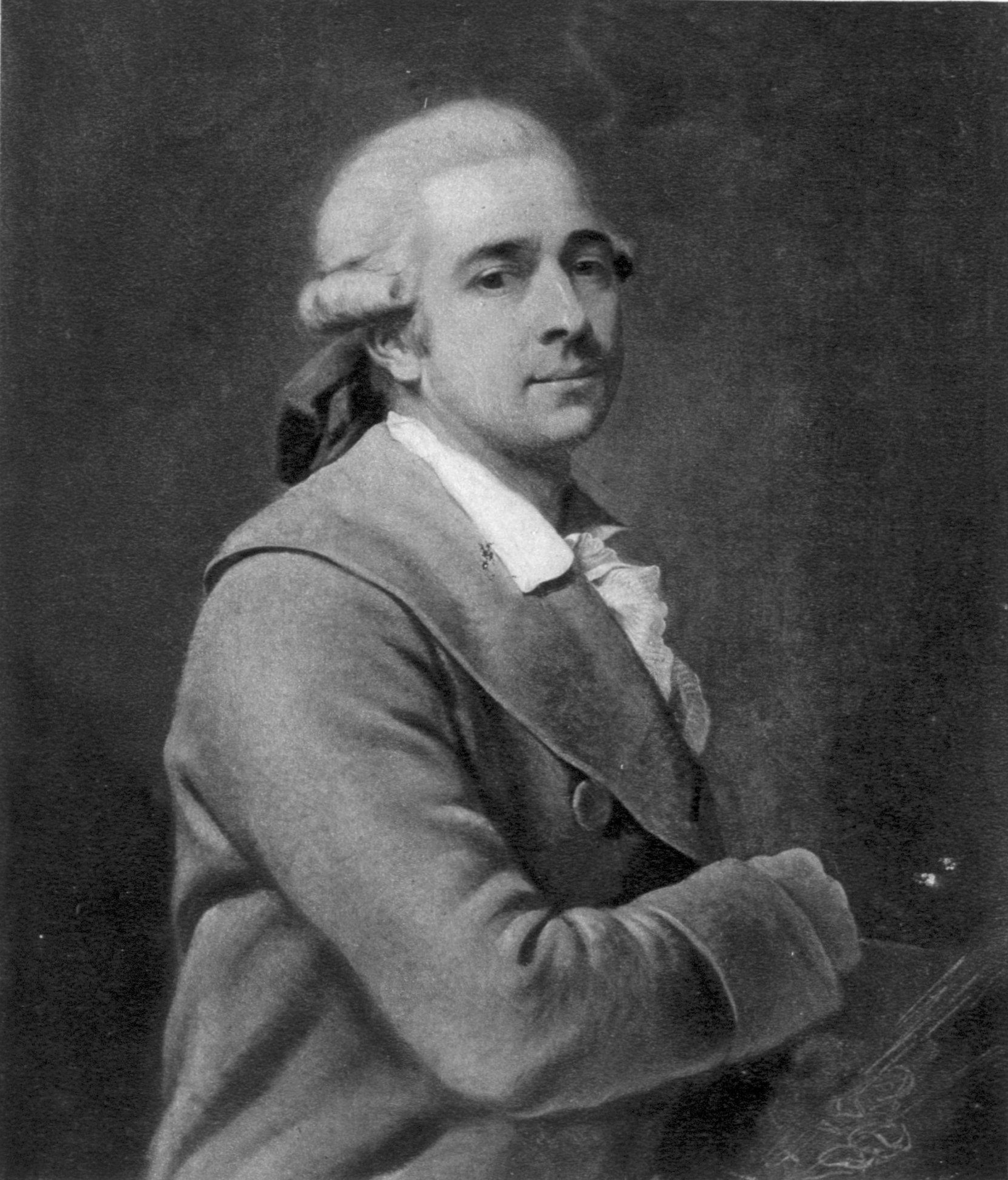 Jacques Sablet, par lui-même